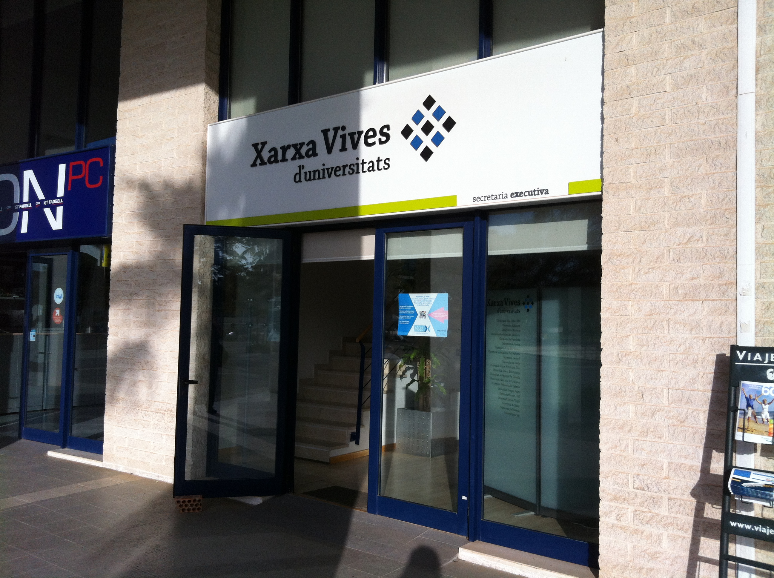 Oficina de la Xarxa Vives a la UJI